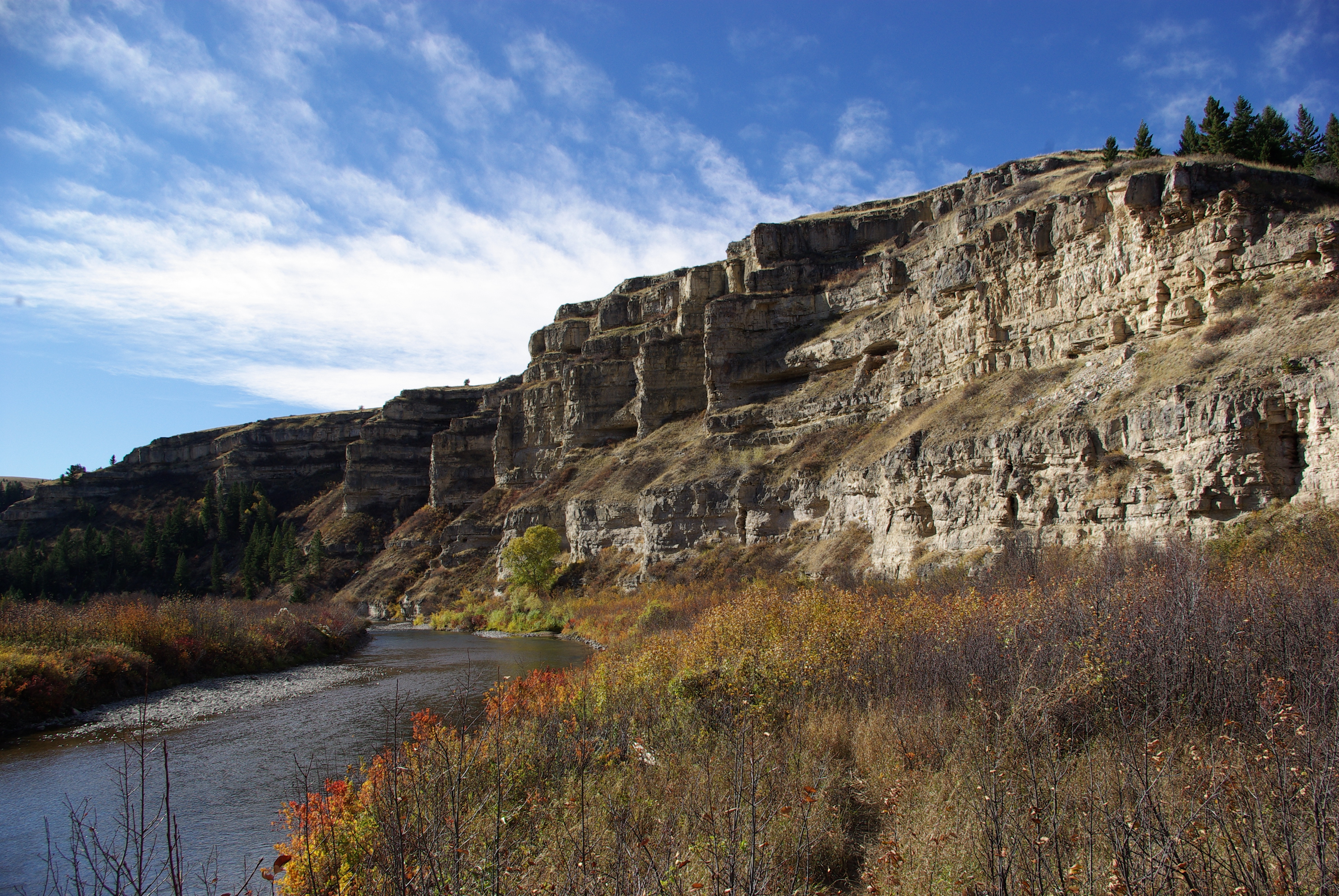 S